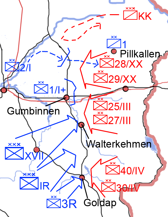 Slaget ved Gumbinnen i Østprøjsen den 19.-20. august 1914